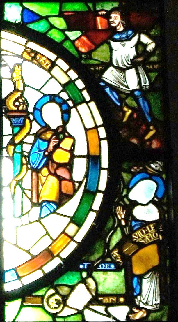 vitrail de Moïse et le serpent d'airain dans le vitrail de la rédemption en la cathédrale de Chalons de 1150.